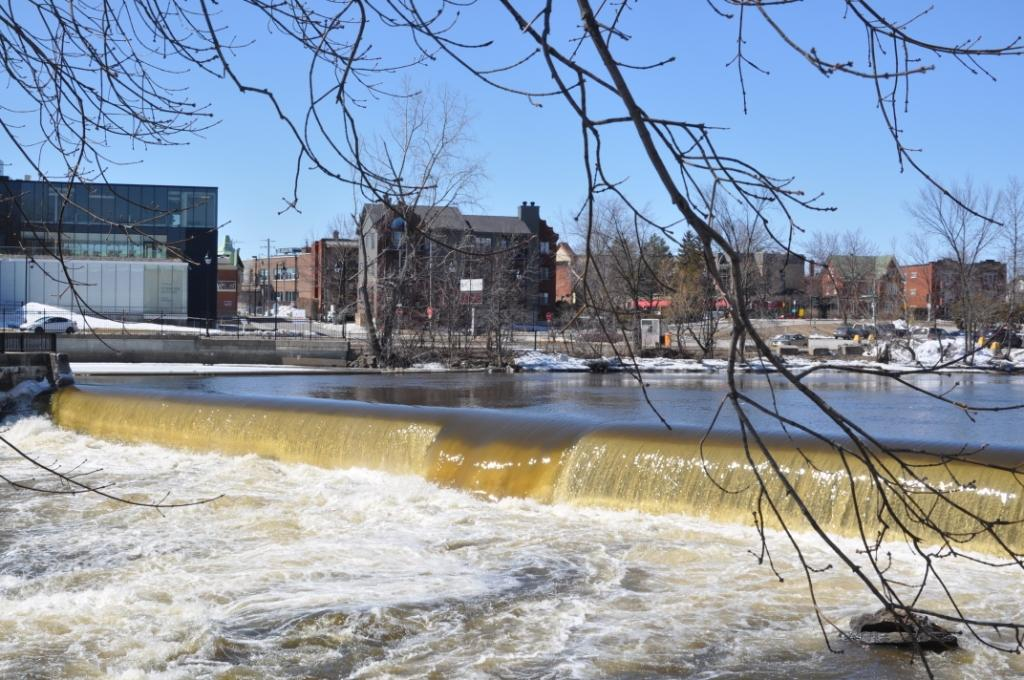 Rivière l'Assomption à Joliette, QC